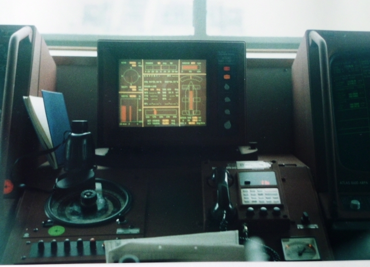 Norasia Samantha, Brückenfahrstand